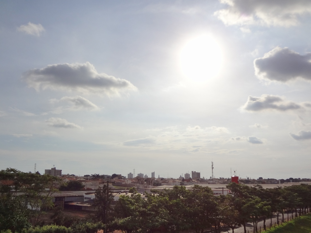 Cidade de Mirassol, SP